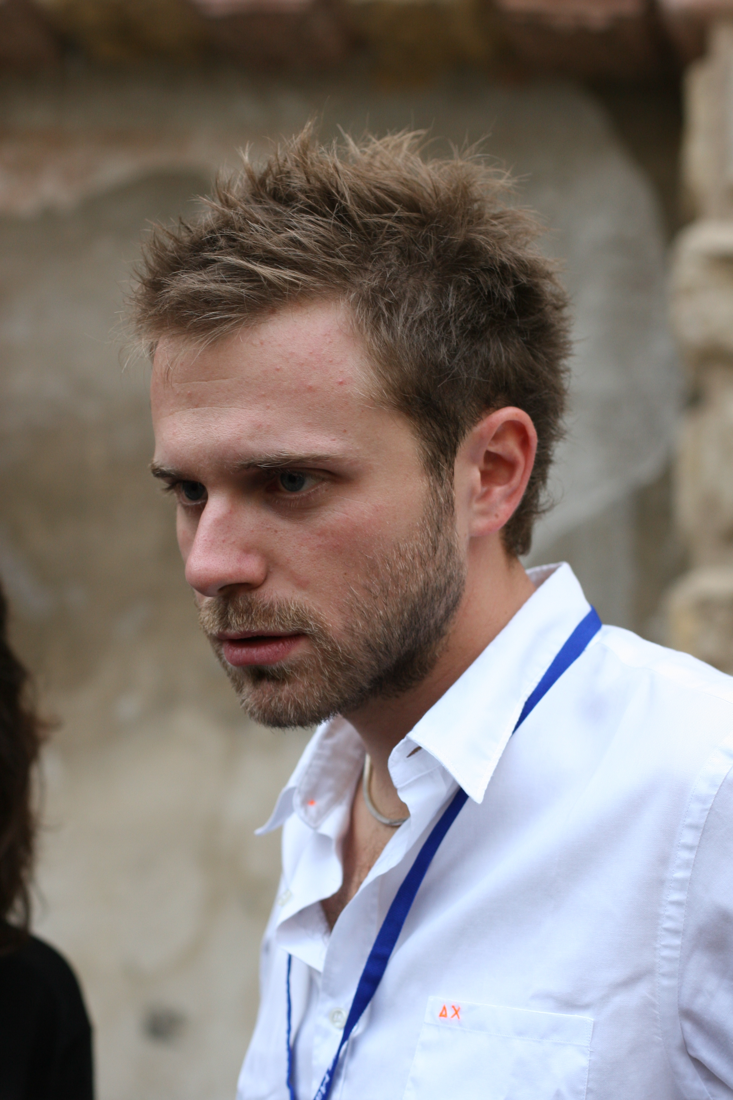 Paolo Giordano al Festivaletteratura di Mantova.